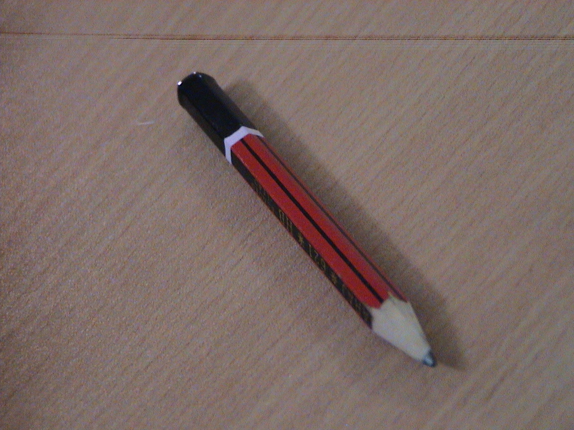 Pencil